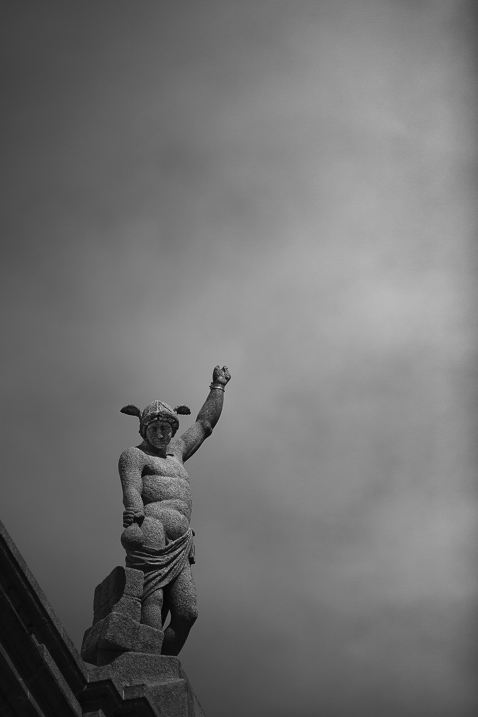 Estátua de Mercúrio no Solar/Palácio do Conde de Bolhão (actualmente, Academia Contemporânea do Espectáculo / Teatro do Bolhão), Rua Formosa, Porto.